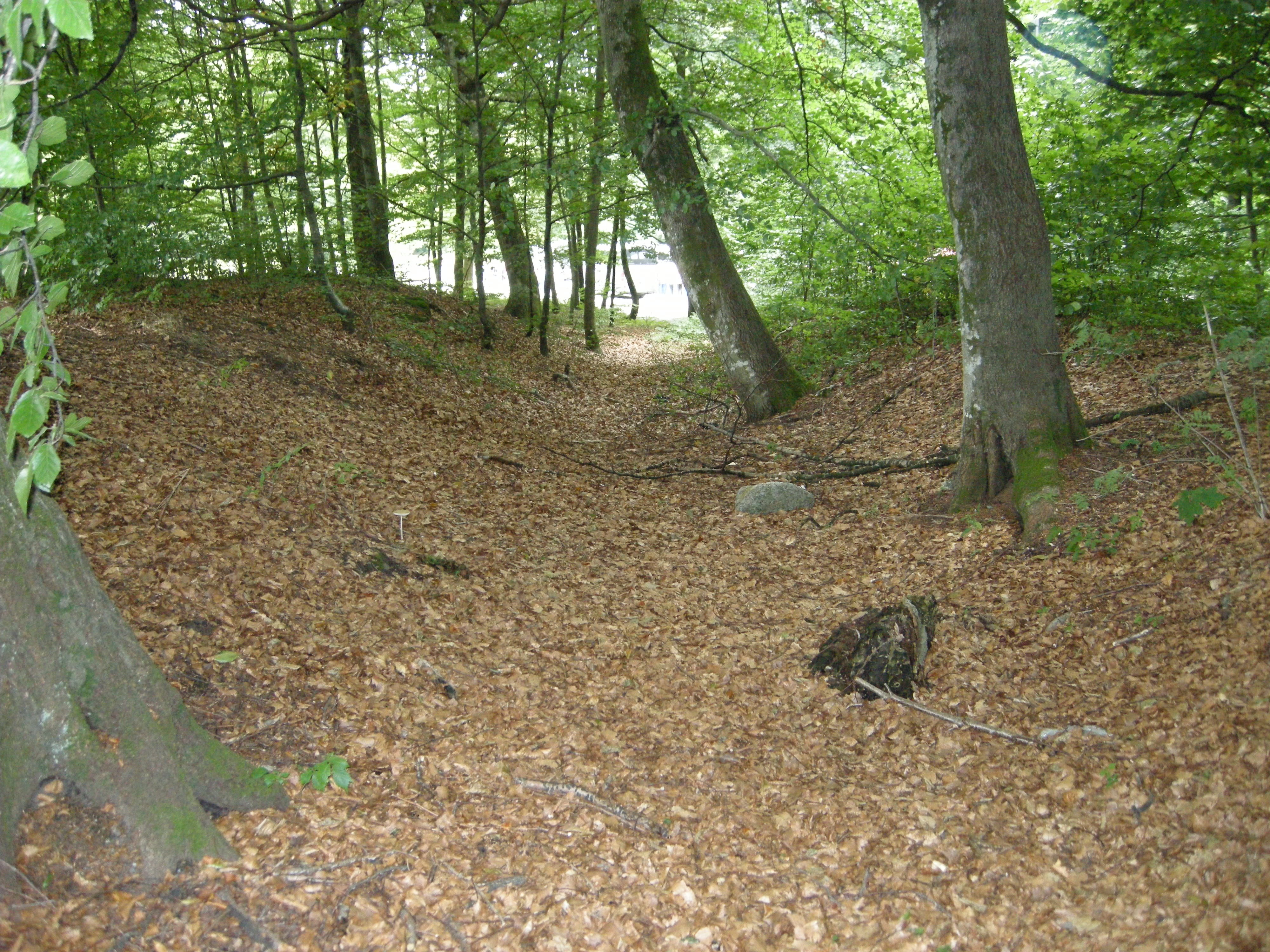 Hulvei i Bøkeskogen i Larvik